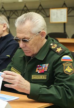 Генерал армии Виктор Николаевич Самсонов